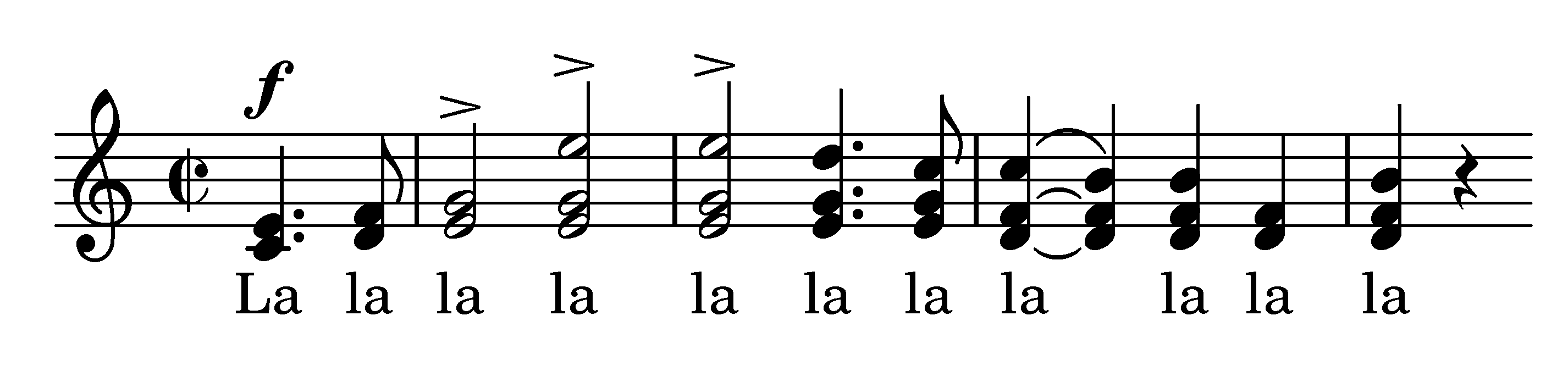 Der kreuzfidele Kupferschmied, Opus 70 Trio, Gesang/Refrain